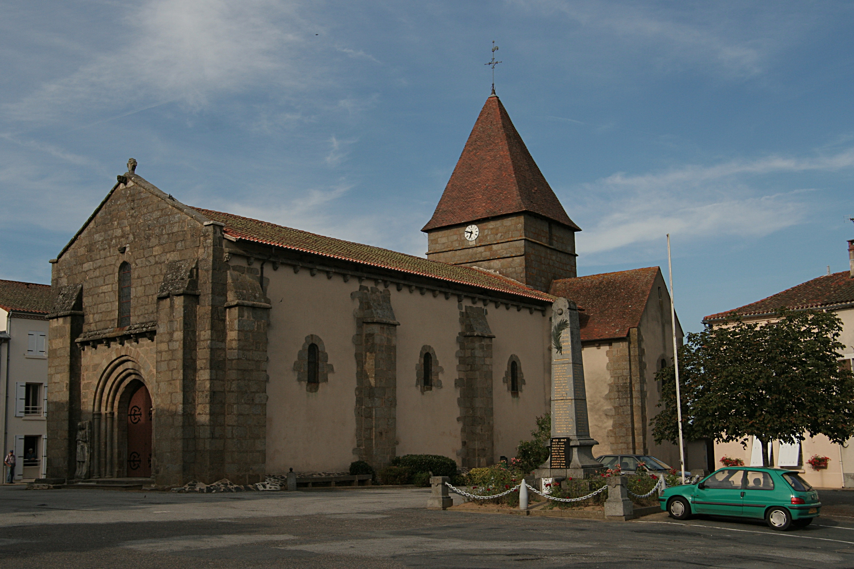 Église Saint-Maurice de Bussière-Poitevine. .